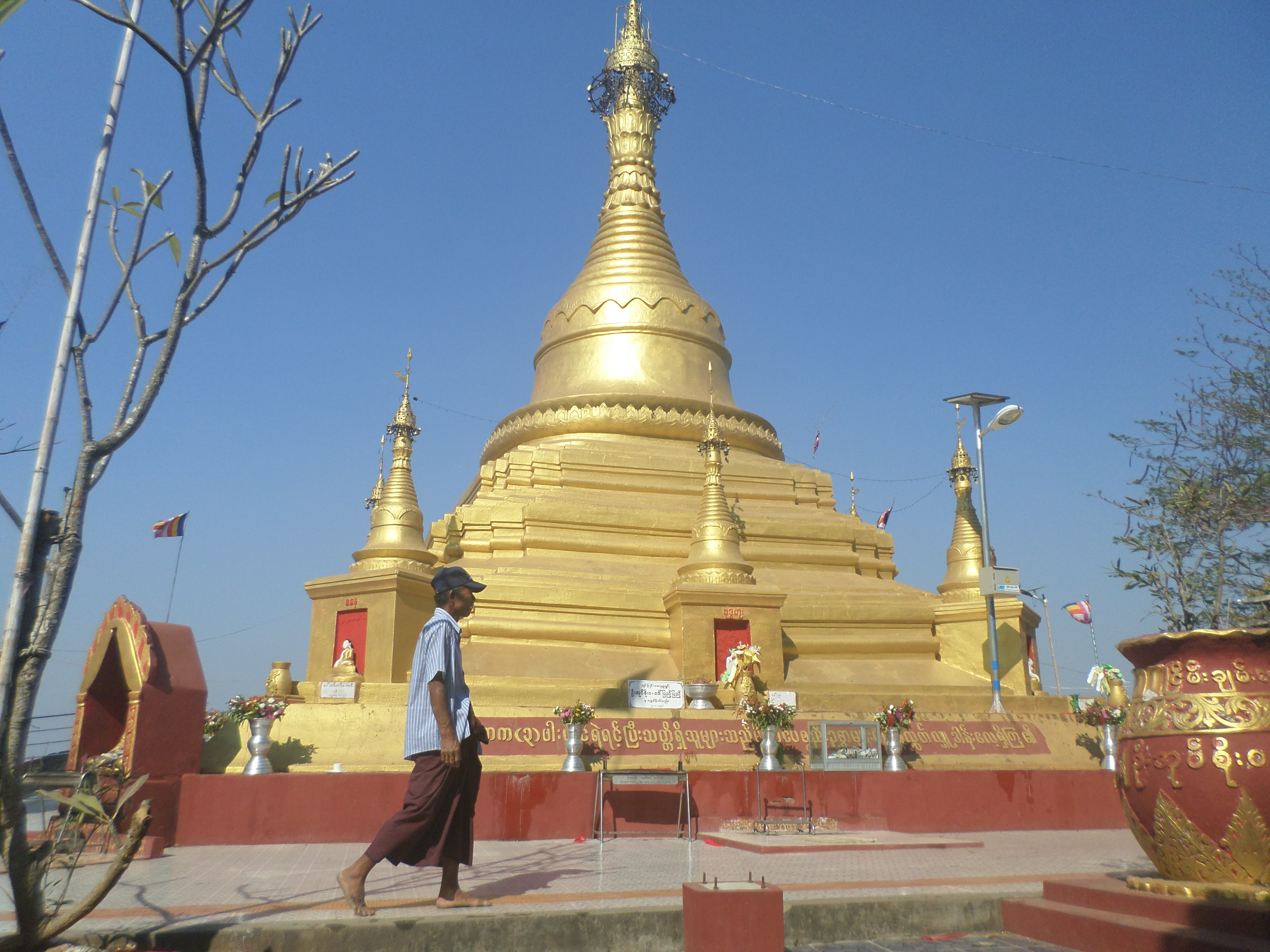 မြန်မာဘာသာ: ရွှေမြင်းတင်စေတီတော်၊ အကောက်တောင်